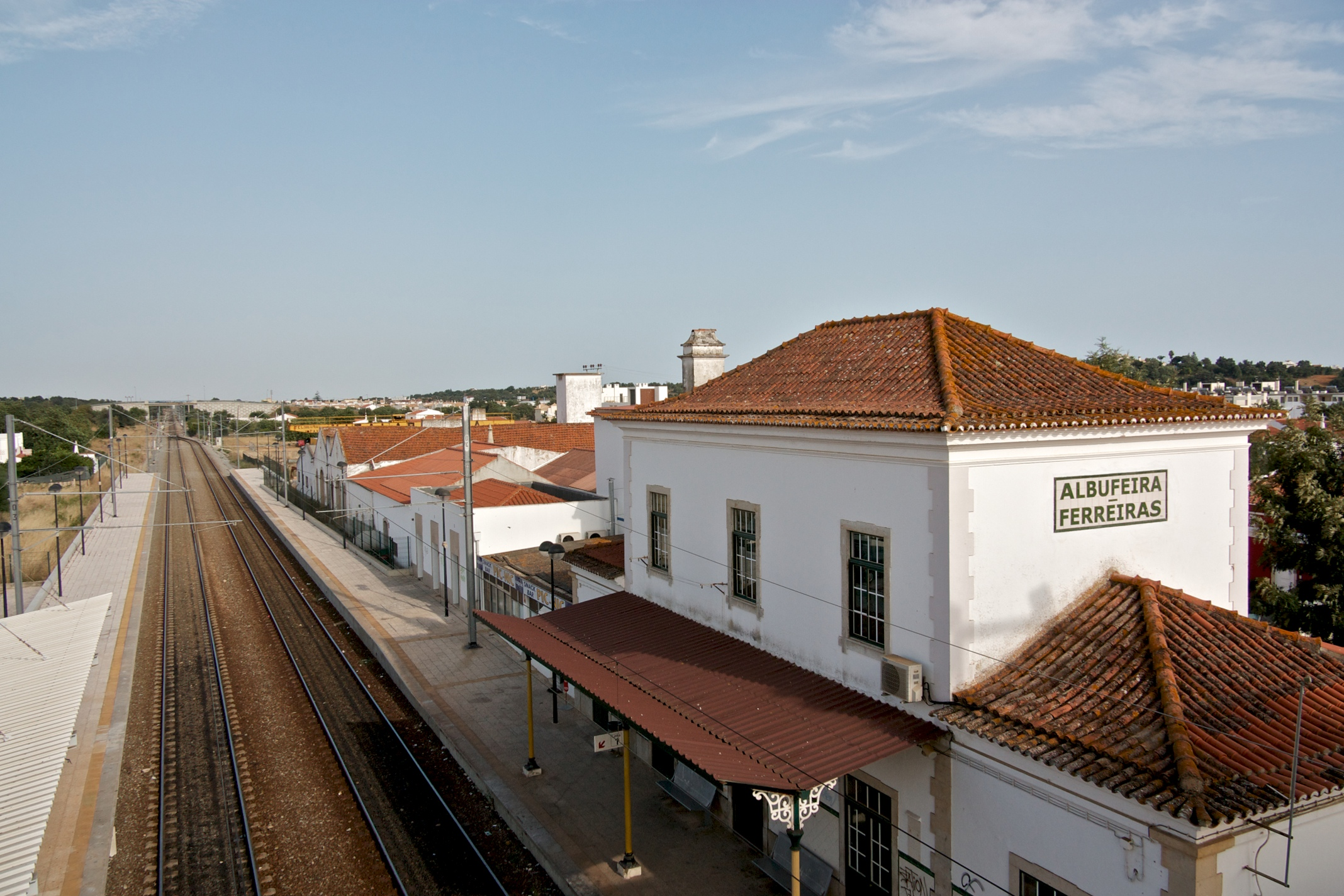 Tipo: ES [ Estação Satélite ] Local: Ferreiras [Linha do Algarve , PK 307] Data e hora: 2 de Julho de 2011 [18h15]